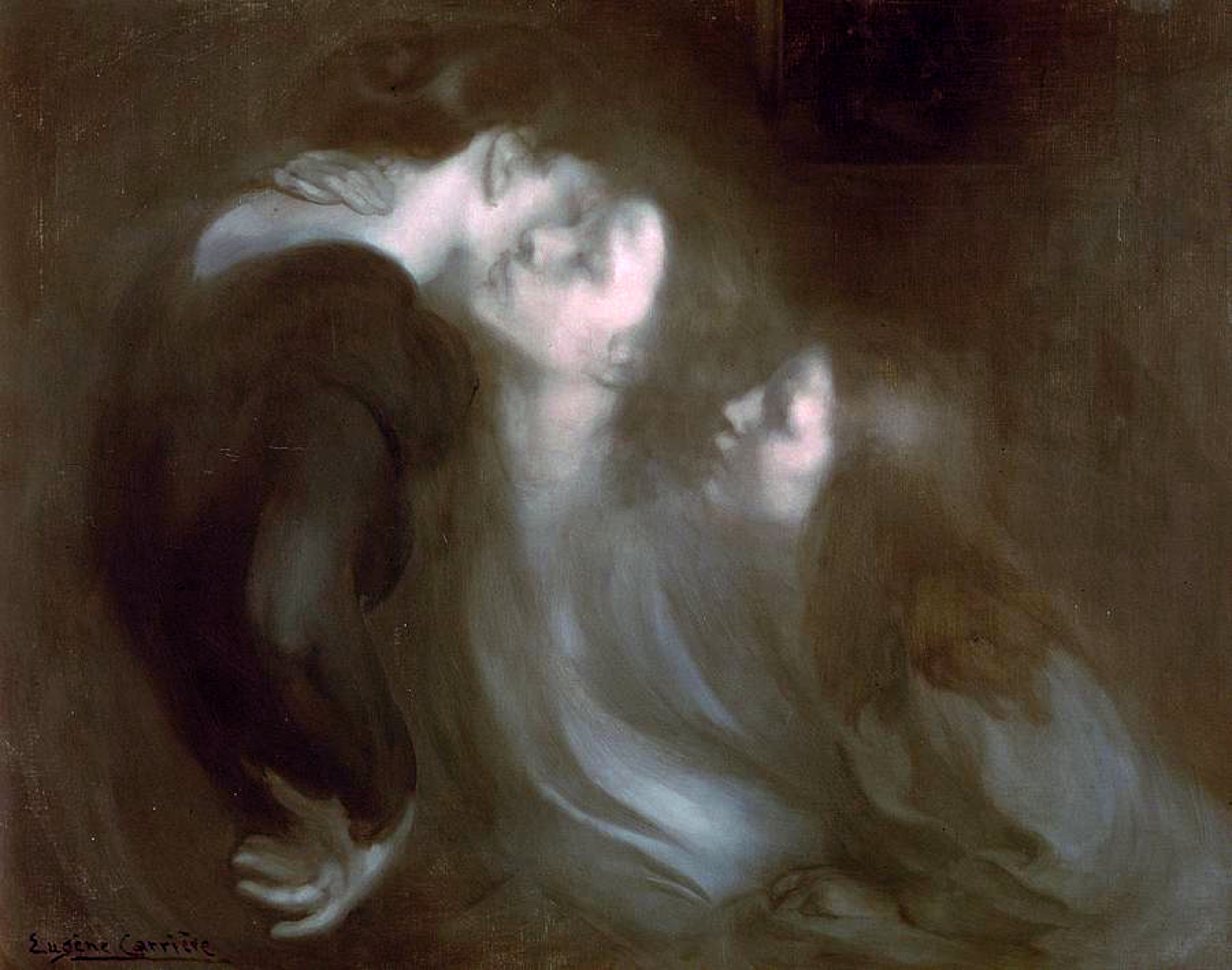 Eugène Carrière, 1899, Le Réveil, Le Baiser à la mère (Her Mother's Kiss), oil on canvas, 94 x 120 cm, Pushkin Museum, Moscow.